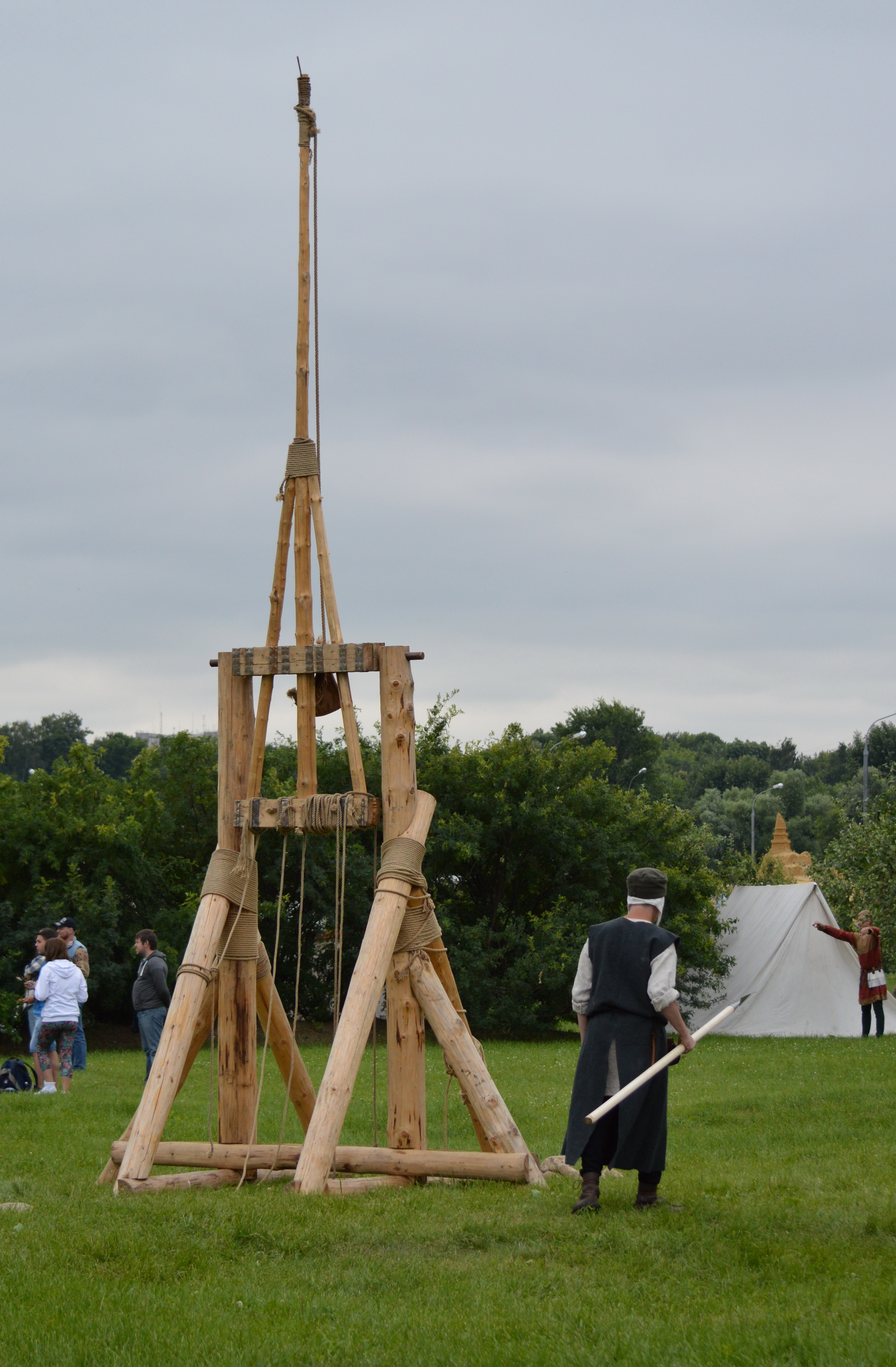 Фестиваль исторической реконструкции "Времена и эпохи" в Коломенском. Метательная машина.